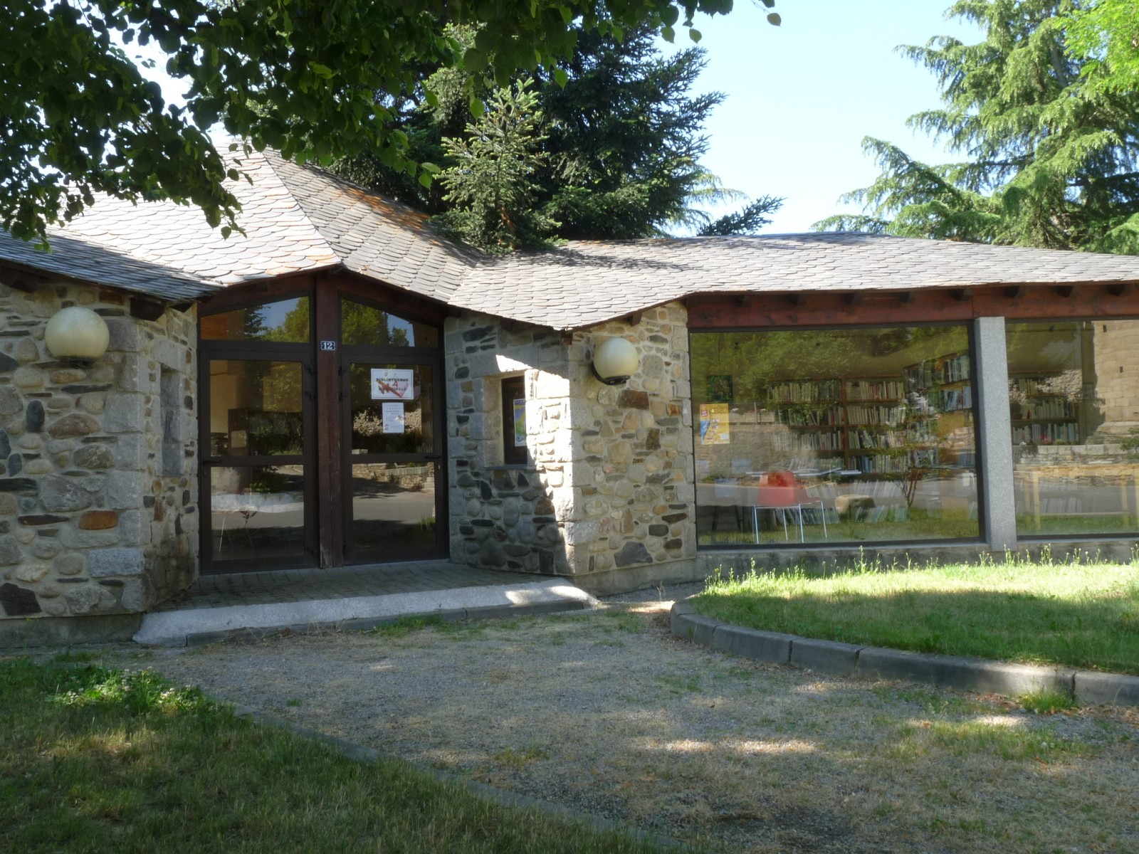 Bibliothèque municipale, Estavar, Pyrénées-Orientales, France